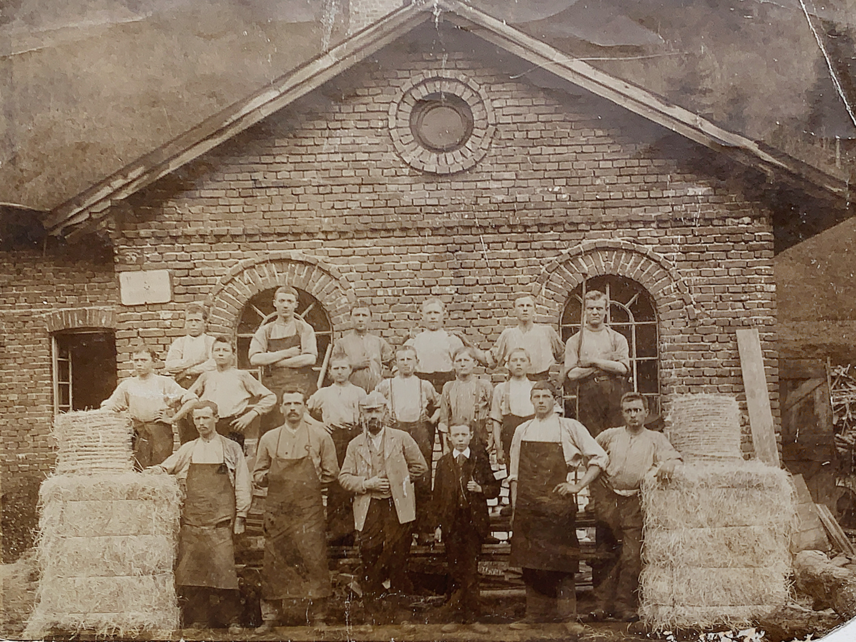 Belegschaft der Holzwollfabrik Offermann in Engelskirchen. Der kleine Junge vorne ist Lehrling Edmund Schiefeling.